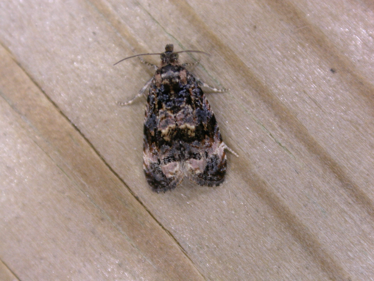 Endothenia oblongana, Gastes, Landes, SW France, 28/29 June 2003